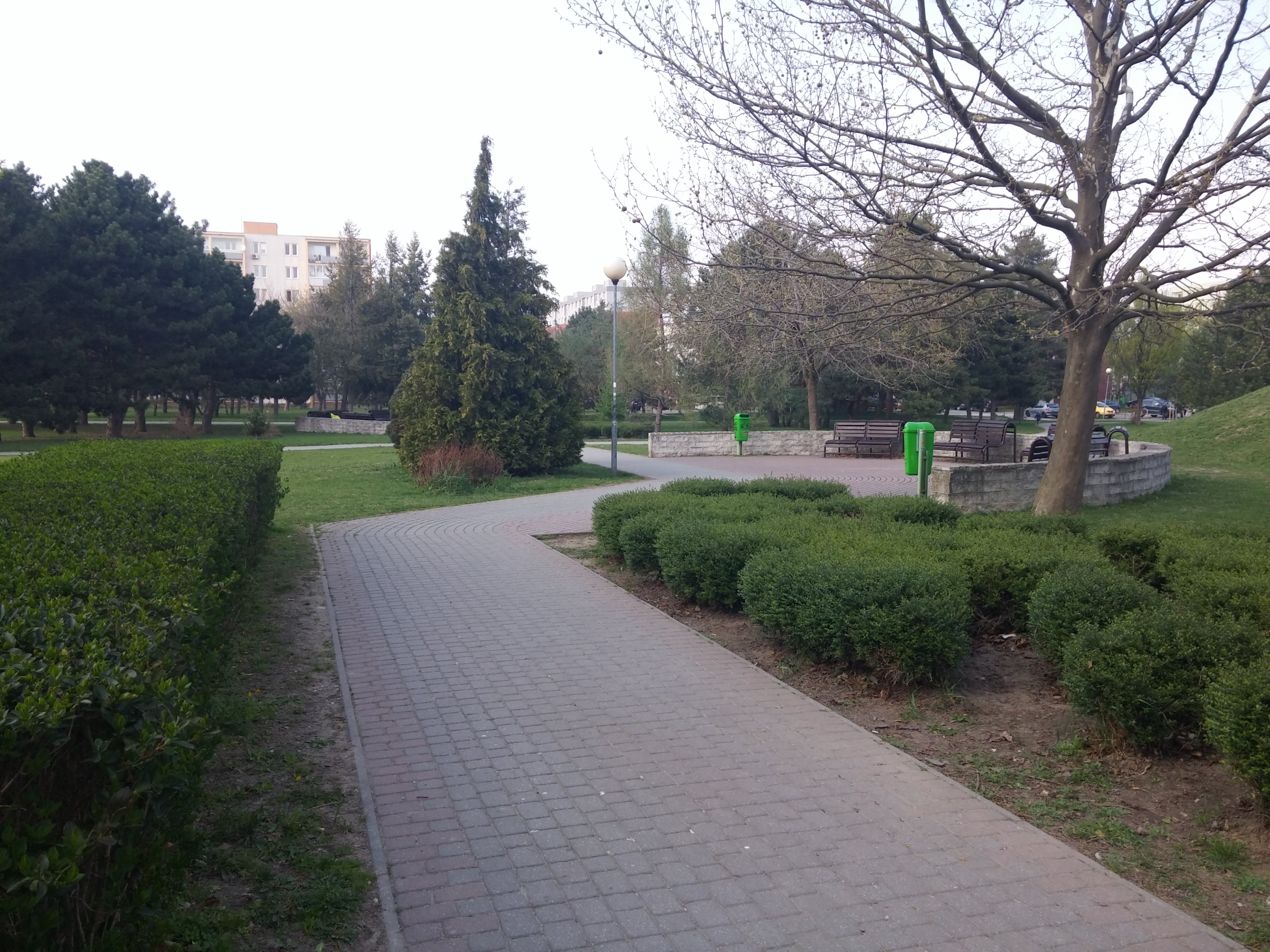 Park Ostredky, Ostredková, Ružinov, Bratislava